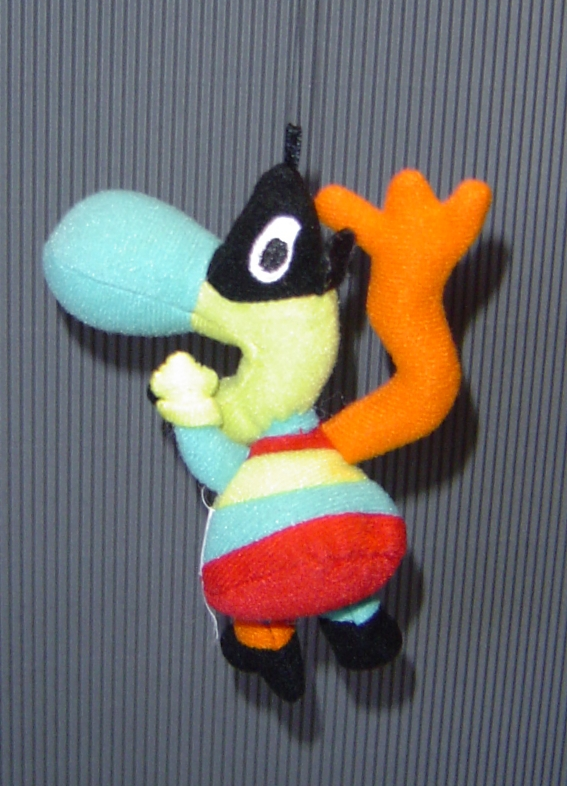 Beschreibung: EXPO 2000 - Twipsy Quelle: selbst fotografiert Fotograf: O. Stapf "Credibility" Datum: Januar 2006 Foto: Digitalbild (größere Auflösung vorhanden)